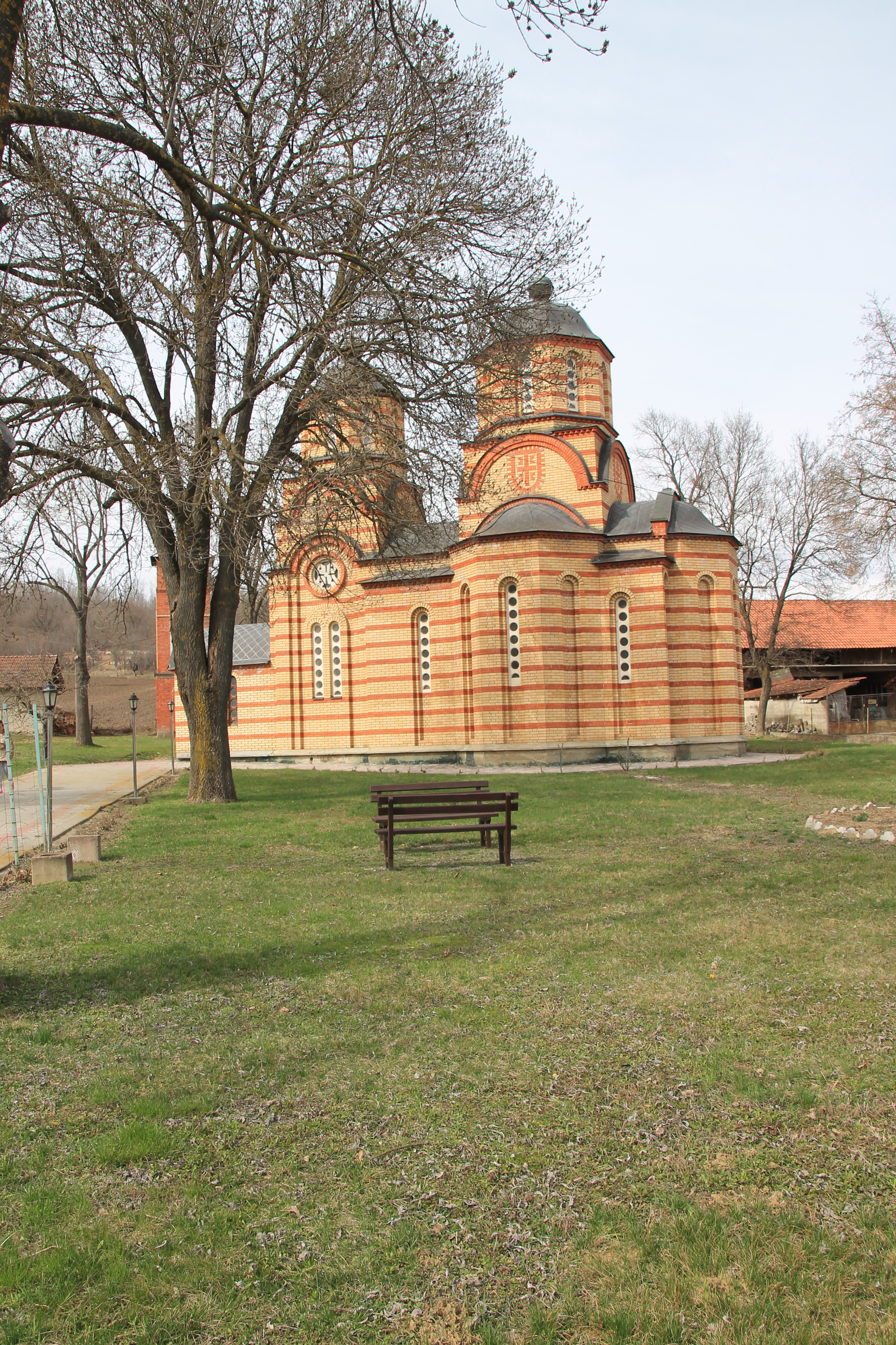 Crkva Sv. cara Lazara (Belušić)